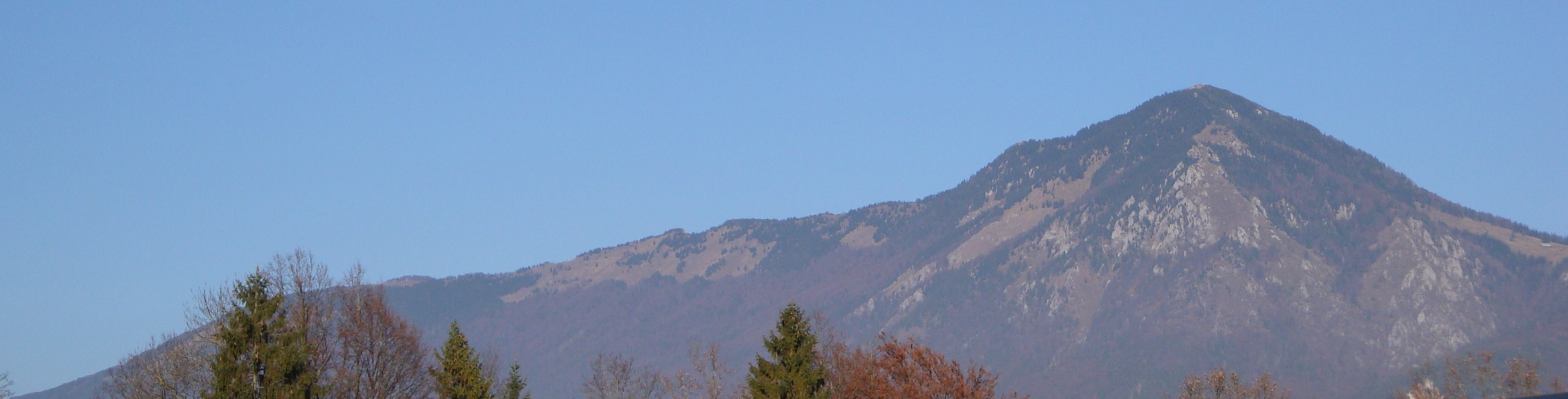 Greben Kriške gore s Tolstim vrhom (jesen 2009).